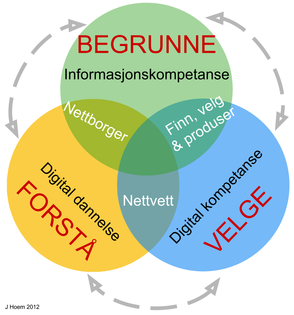 Digital dannelse: Dannelse kompetanse.